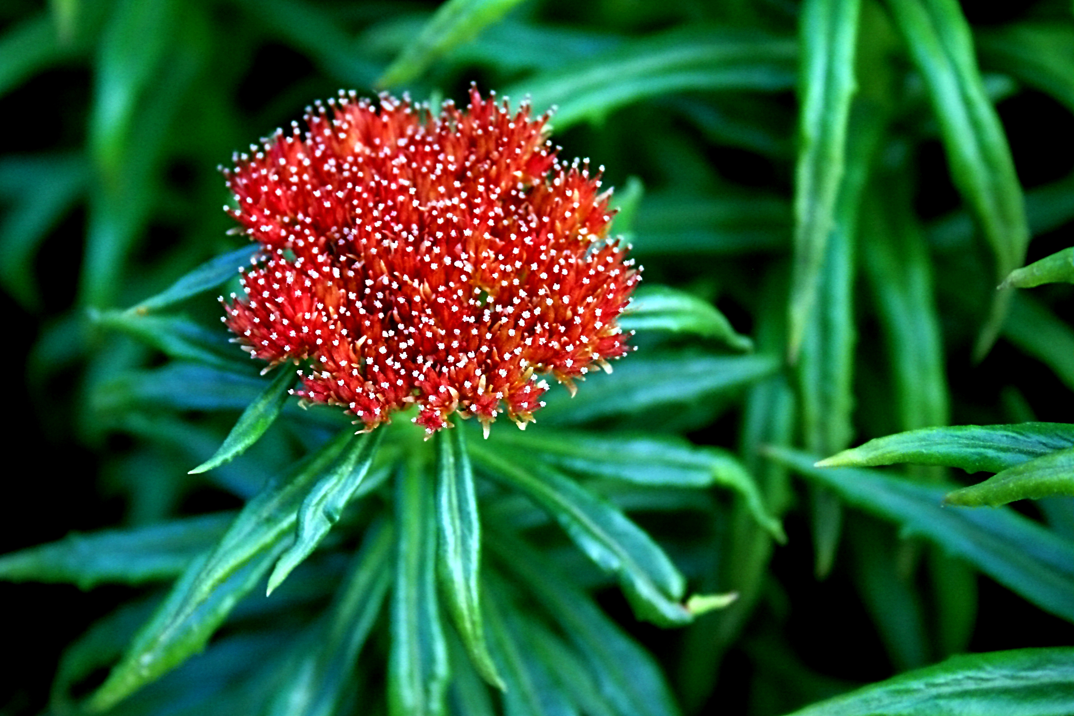 Ísland, Akureyri Botanical Gardens: Rhodiola (isländisch: Hnappasvæfla)